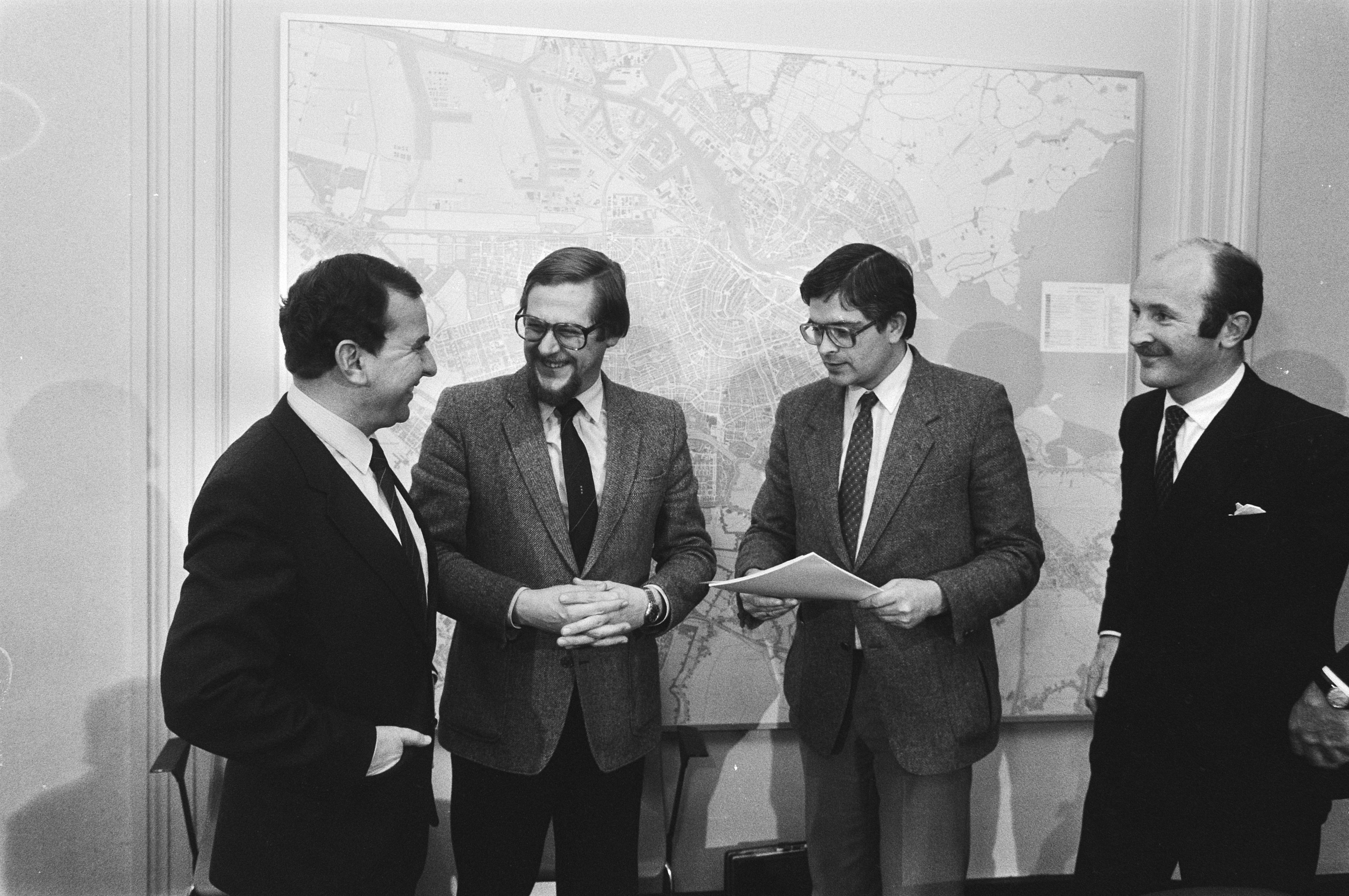 Collectie / Archief : Fotocollectie Anefo Reportage / Serie : [ onbekend ] Beschrijving : Wethouder Heerma krijgt een rapport aangeboden van de werkgroep die dit op verzoek van het college van B&W opstelde, over de betekenis van ADM voor de Amsterdamse regio. V.l.n.r. de leden van de werkgroep: drs. J.J.M. Oostenbrink, wethouder Heerma, dr. J.G. Lambooy enn mr. J.F. Wijsmuller Datum : 10 januari 1983 Locatie : Amsterdam, Noord-Holland Trefwoorden : adviezen, industrie, scheepsbouw, werkgroepen Persoonsnaam : Lambooy, J.G., Oostenbrink, J.J.M., Wijsmuller, J.F. Instellingsnaam : ADM Fotograaf : Bogaerts, Rob / Anefo Auteursrechthebbende : Nationaal Archief Materiaalsoort : Negatief (zwart/wit) Nummer archiefinventaris : bekijk toegang 2.24.01.05 Bestanddeelnummer : 932-4593